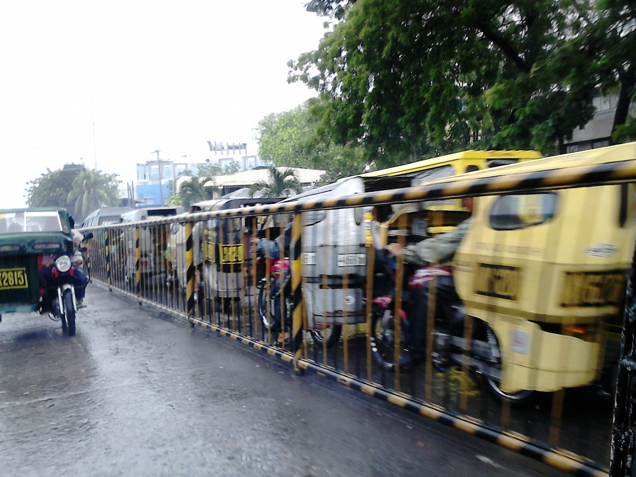 J. Catolico Avenue traffic jam